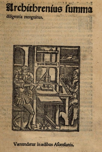 Jean d'Hauville, Architrenius title page